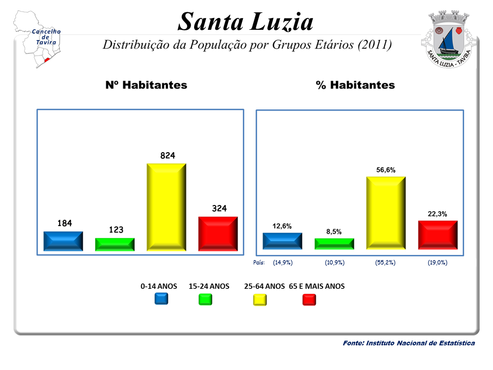 Censos 1864/2011